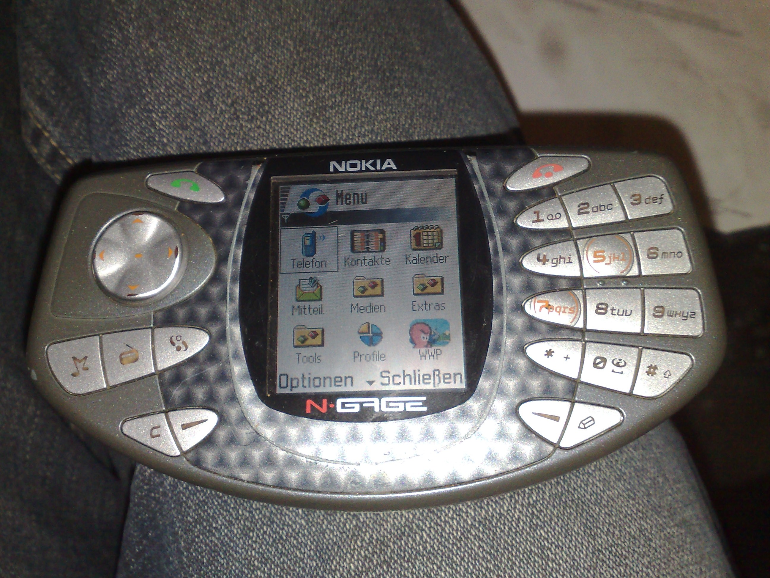 Deutsches N-Gage